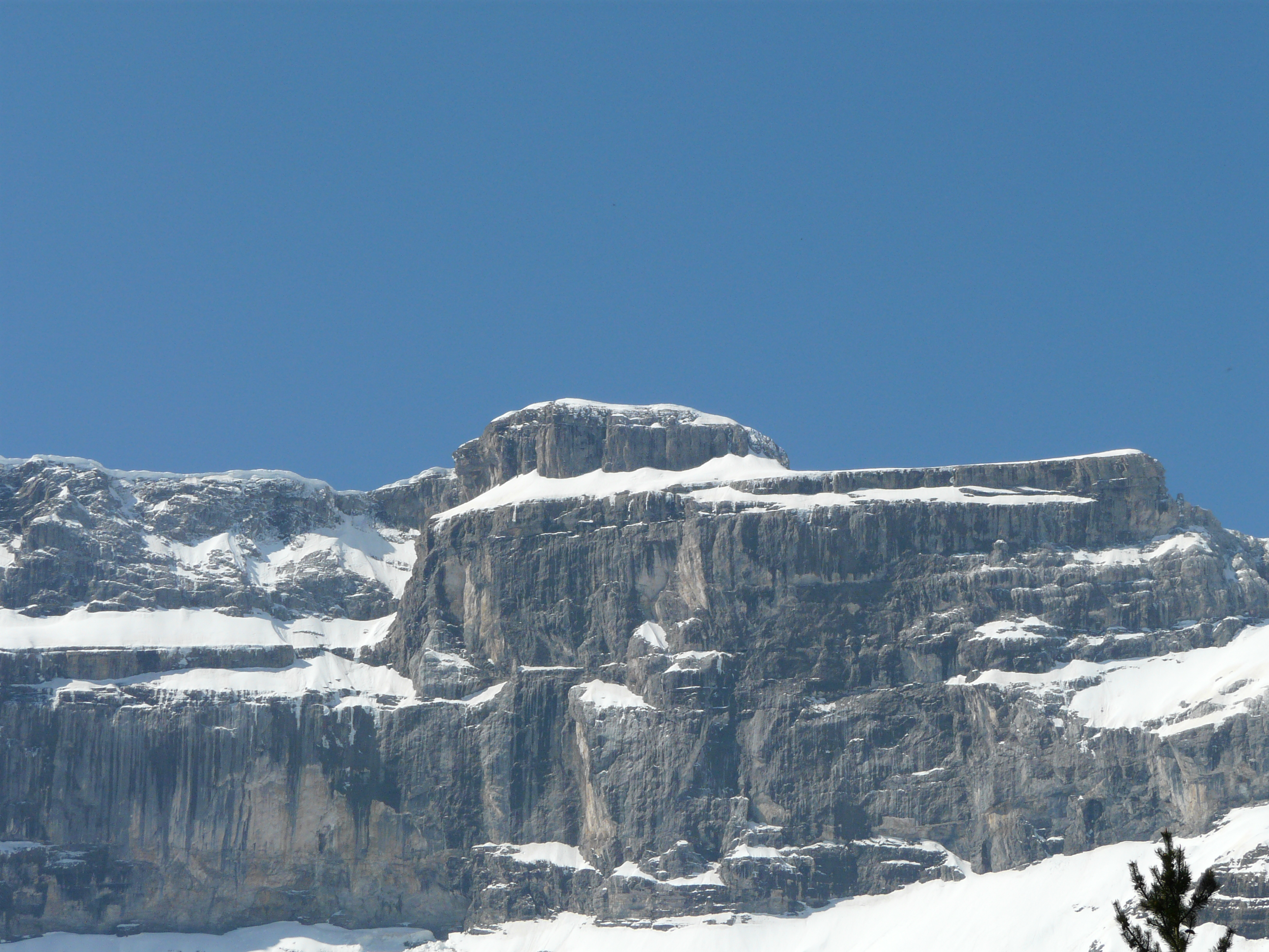 La Tour (3009 m), Cirque de Gavarnie, Hautes-Pyrénées, France.